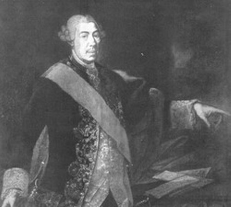 Domenico Caracciolo marchese di Villamaina un politicone napolitano